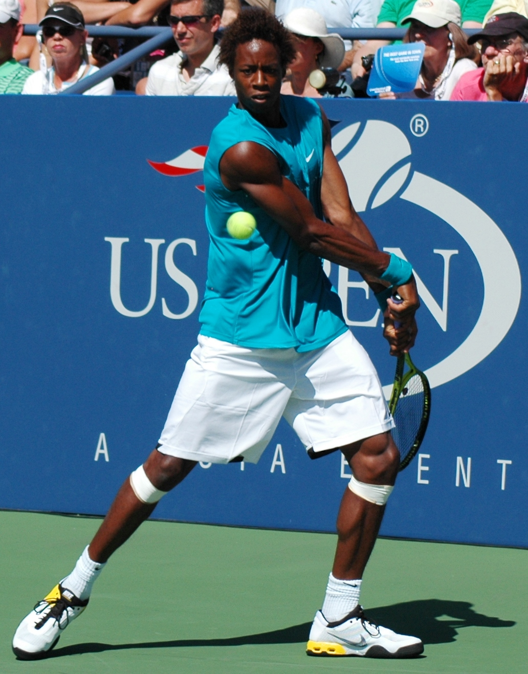 Gael Monfils US Open 2009